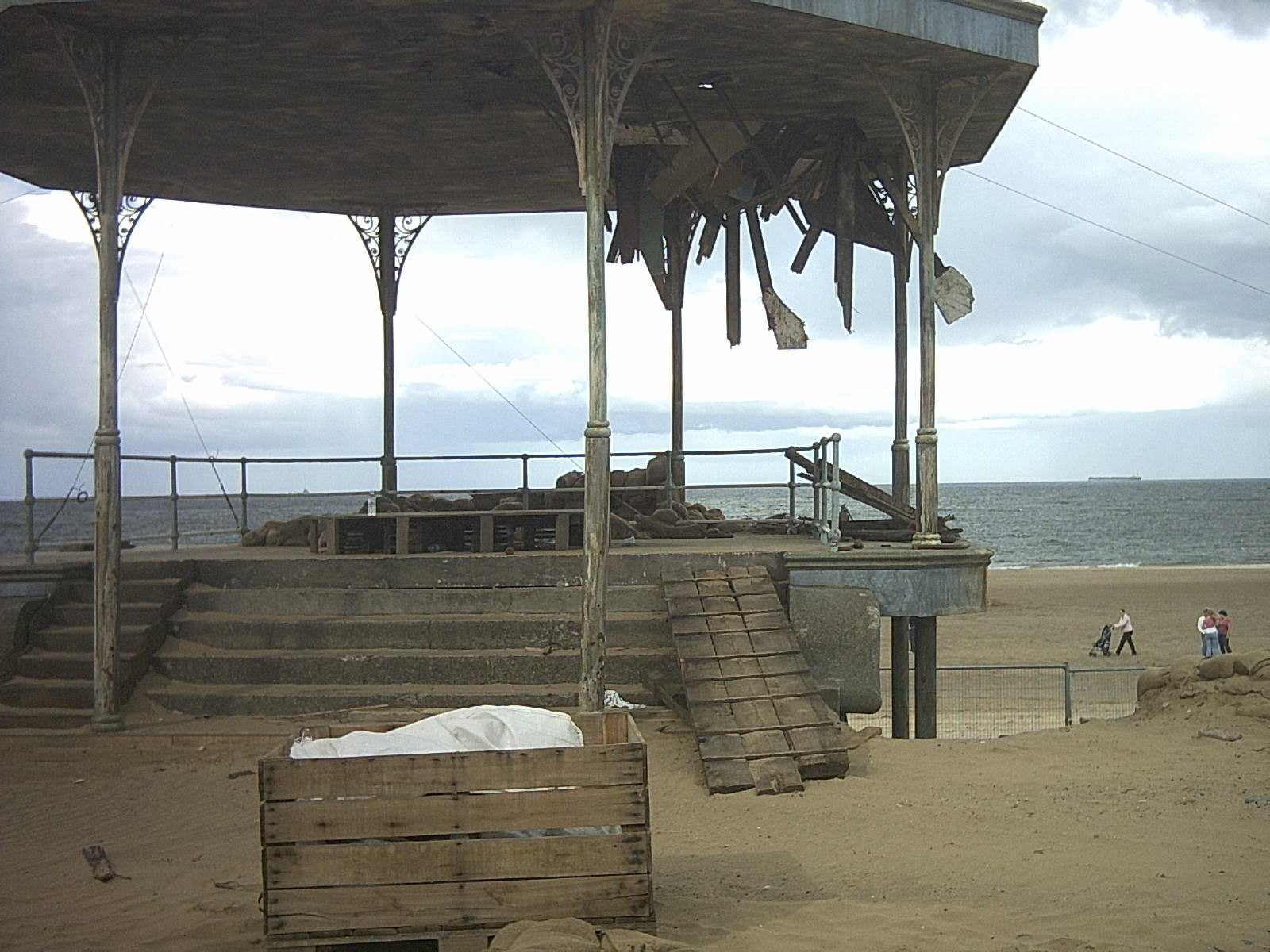 Film Set Redcar (August 2006)